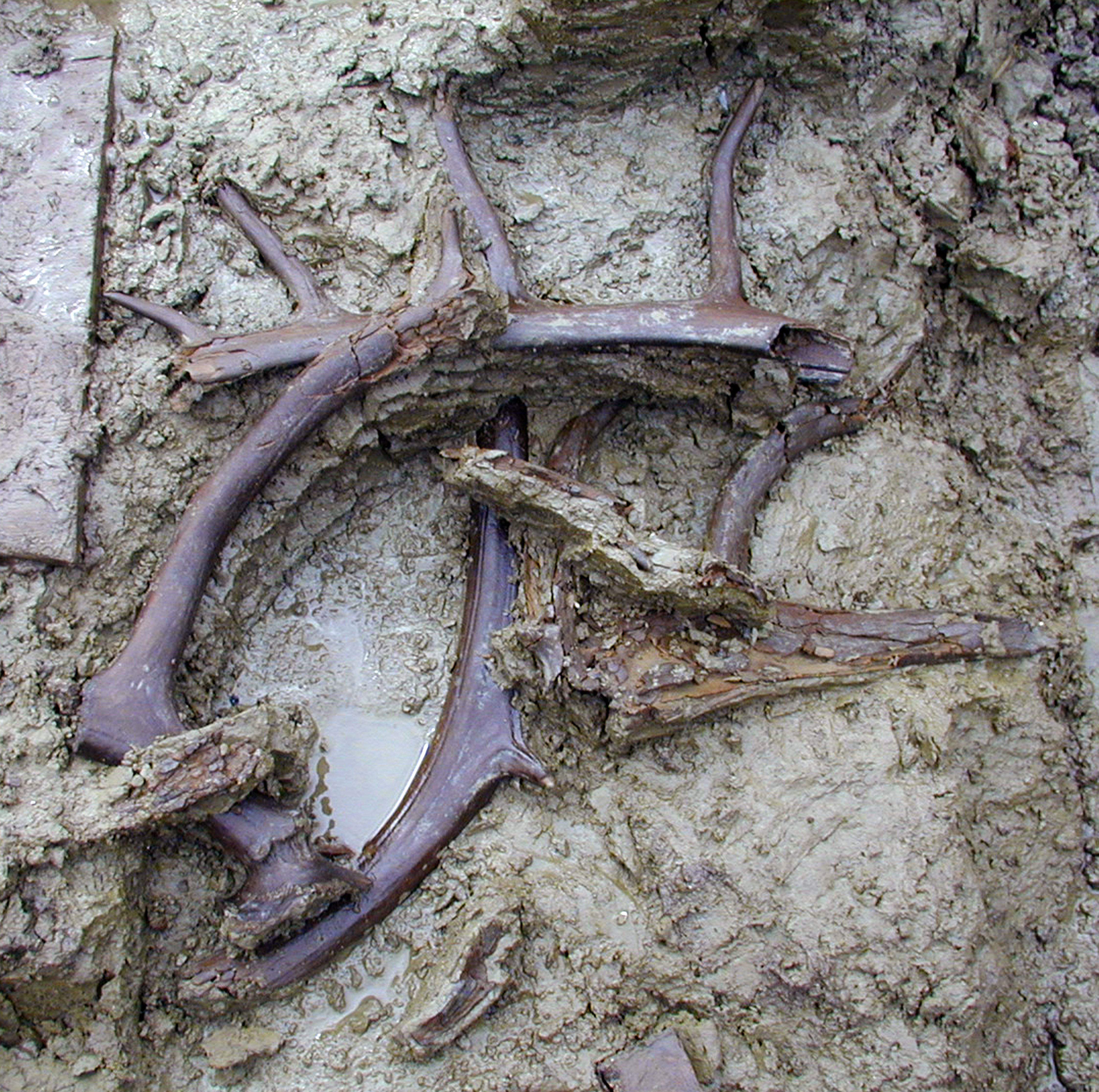 En novemberdag for cirka 14.000 år siden kom de første mennesker til Danmark. Det viser nye undersøgelser fra Nationalmuseet af knogler og gevirer fra mindst tolv rensdyr. Læs om undersøgelsen: Foto: Jørgen Holm, Nationalmuseet